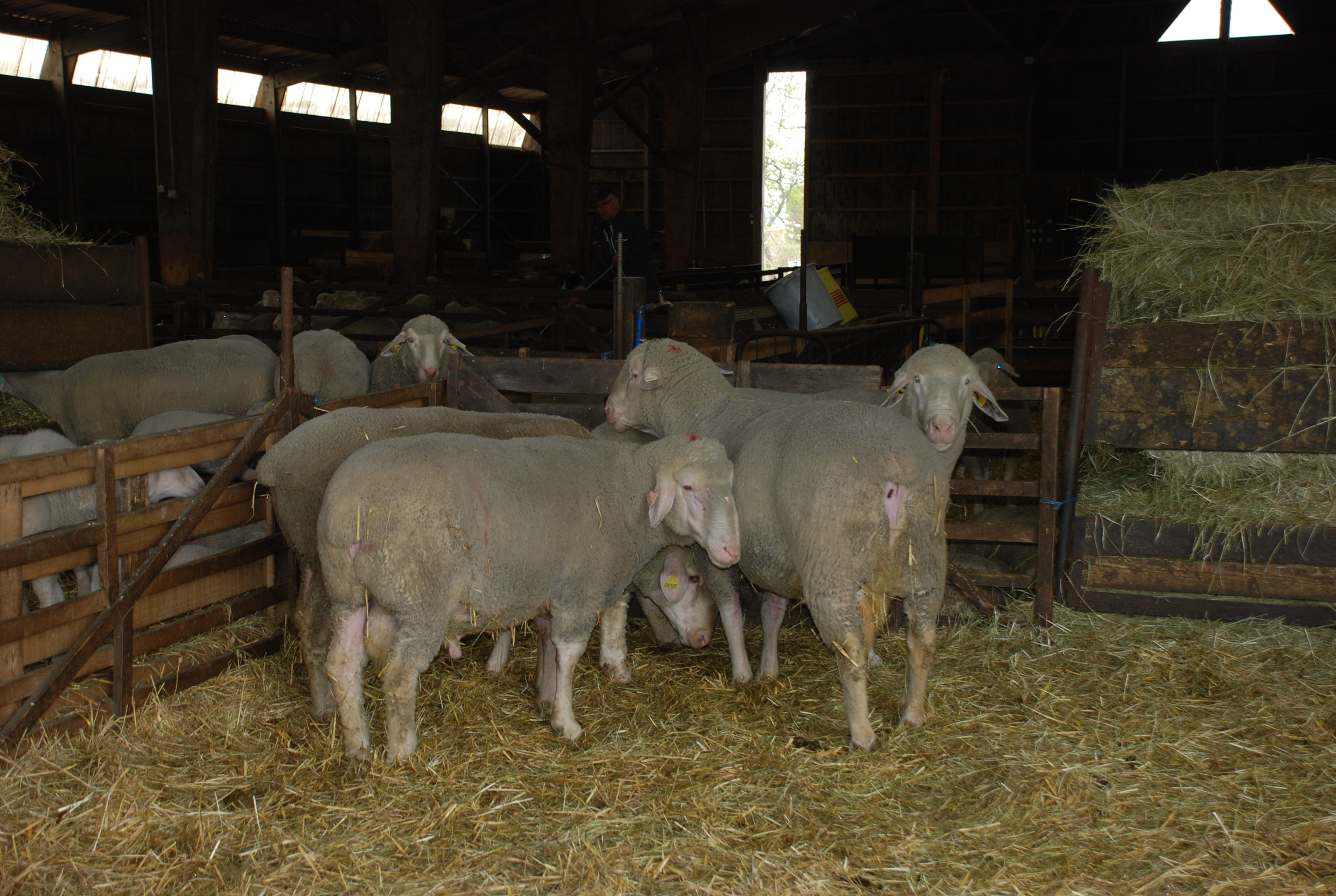 Béliers de la race ovine de l'Est à laine mérinos, élevage Simon, ferme du château, à Prény (Meurthe et Moselle)